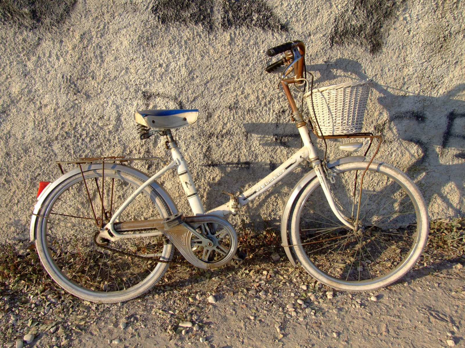 rostiges Peugeot Klapprad